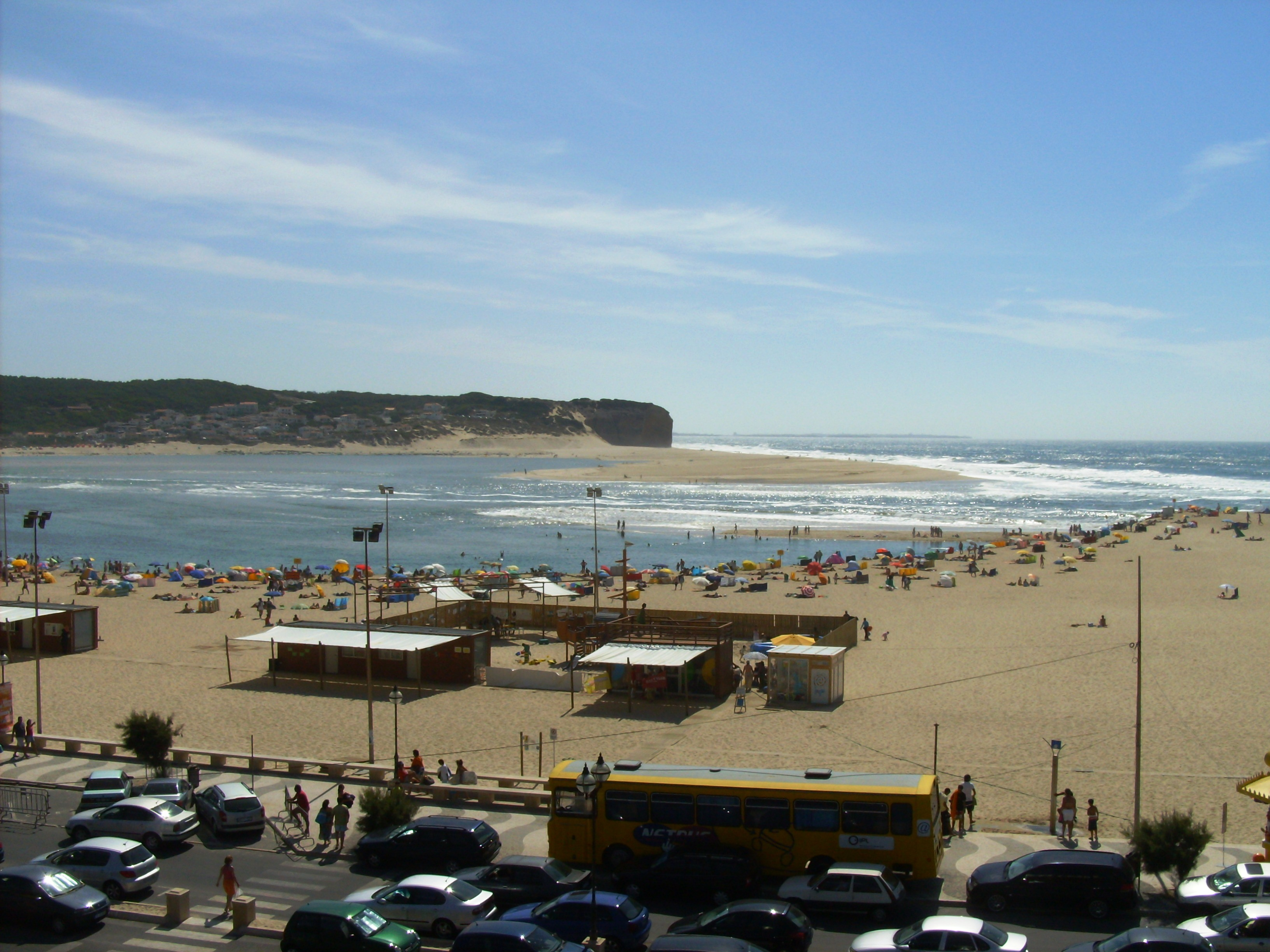 Foz do Arelho, concelho de Caldas da Rainha, distrito de Leiria, Portugal: view of the beach (Summer 2008)